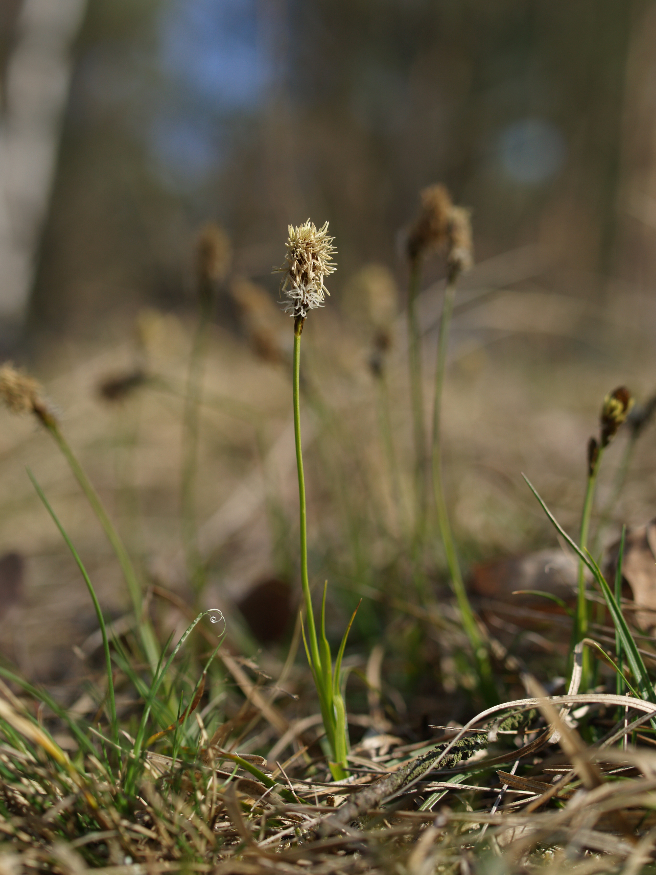 Kozí vršek (přírodní památka) - jaro - Carex caryophyllea Latourr., ostřice jarní - status ohrožení v ČR: není